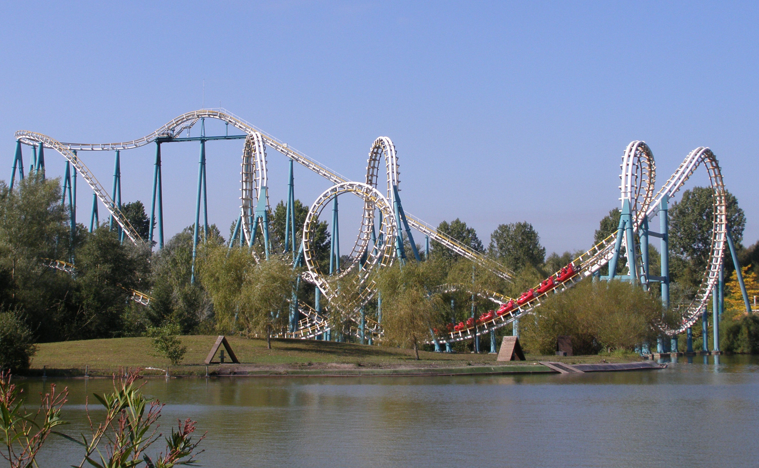 L'attraction Goudurix du Parc Astérix, le plus grand grand huit d'Europe